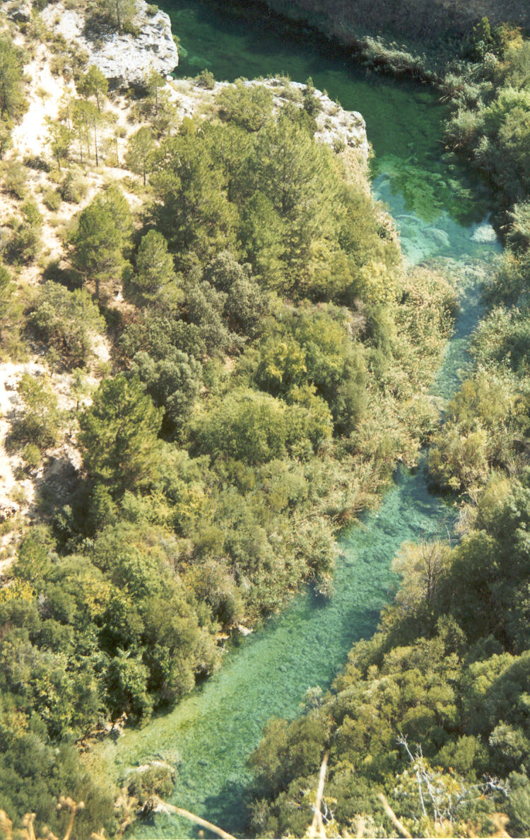 El río Júcar desde el Ventano del Diablo (Cuenca). Fecha: octubre 2002. Autor Fev